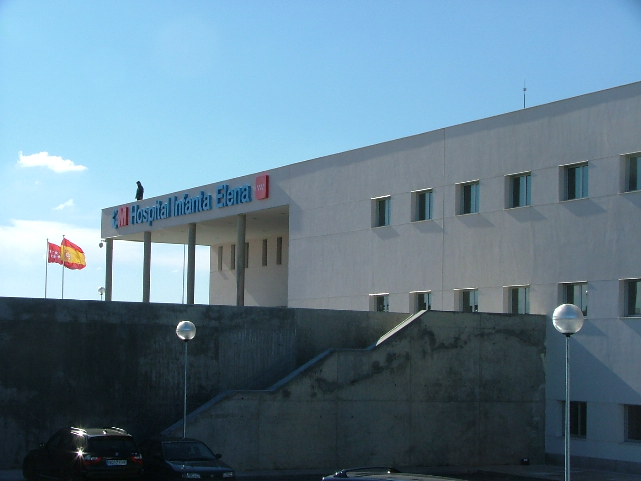 Fachada principal del Hospital Infanta Elena el día de su inauguración